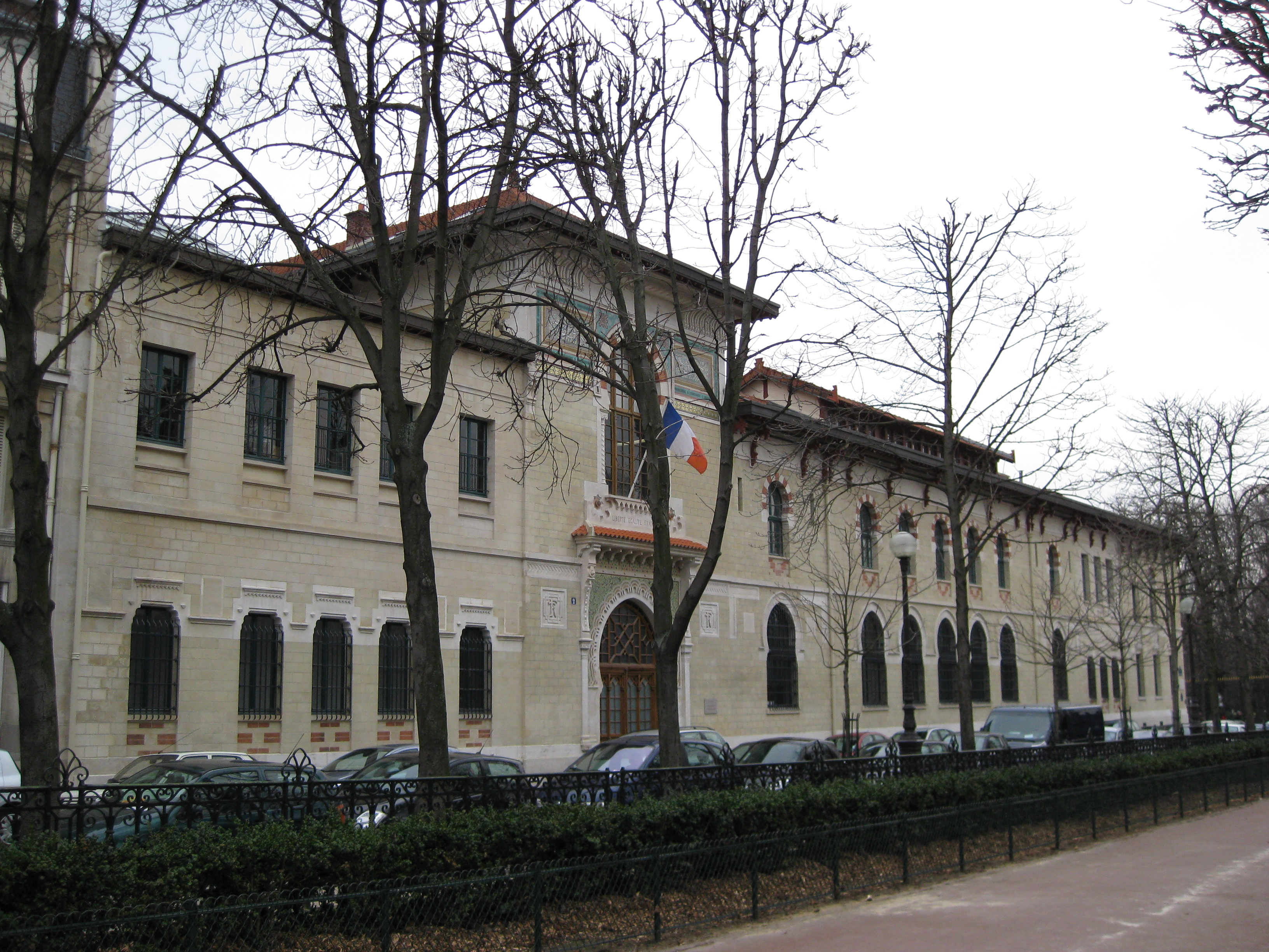 École nationale d'administration (ENA). Bâtiment de l'ancienne École nationale de la France d'outre-mer, 2 avenue de l'Observatoire, Paris 6e.